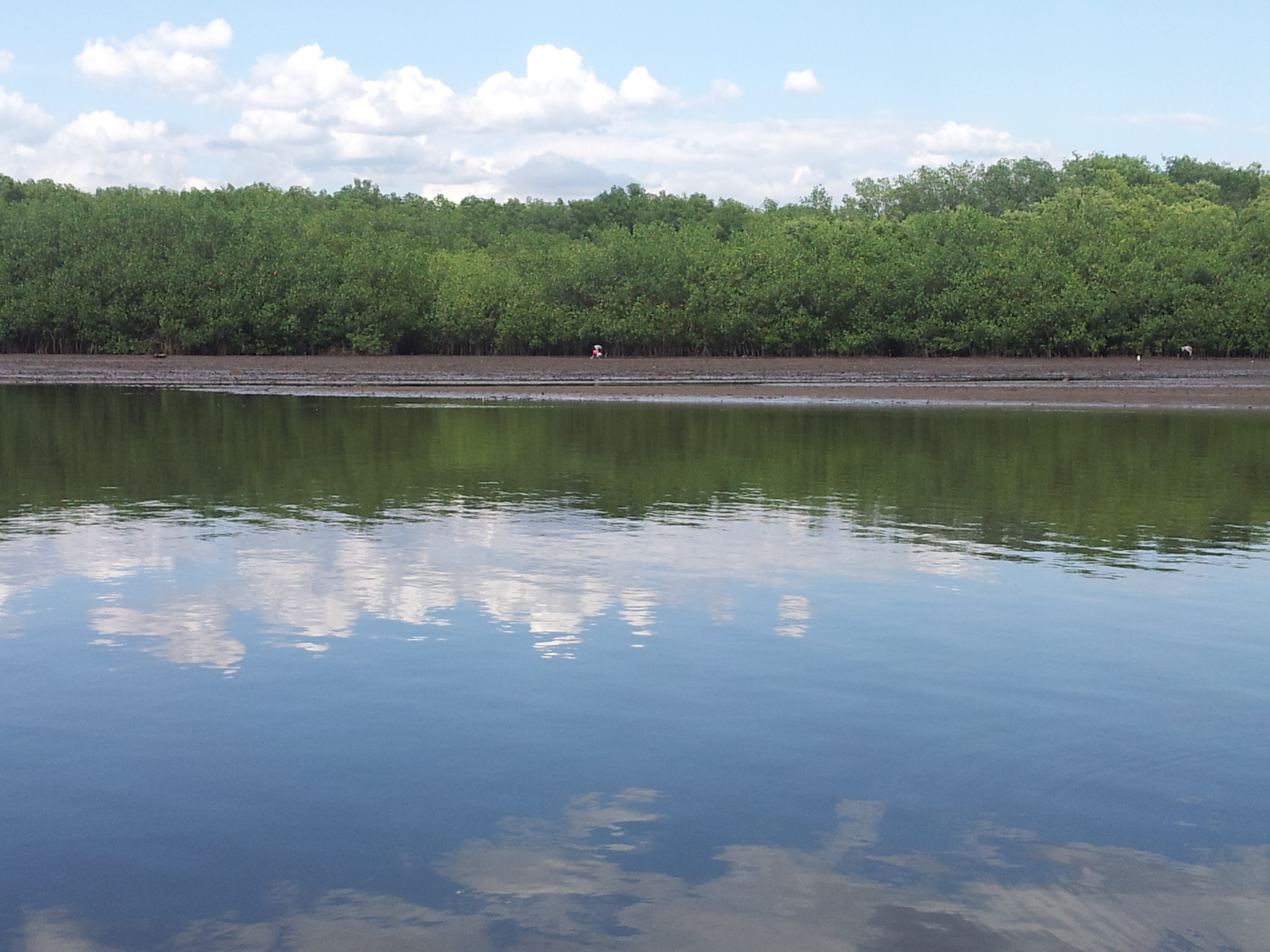 Jujutla, El Salvador